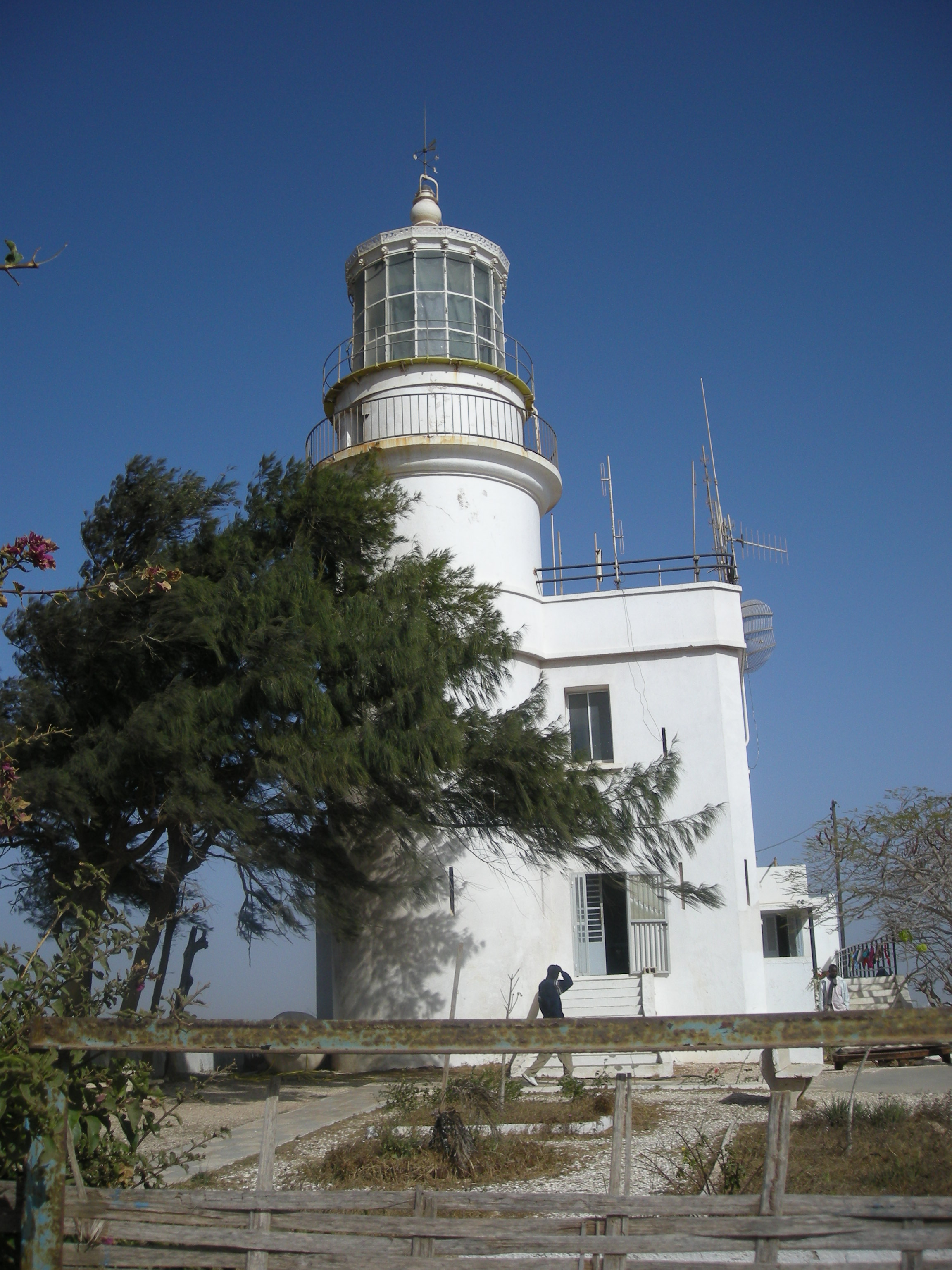 Le Phare des Mamelles (Dakar, Sénégal)